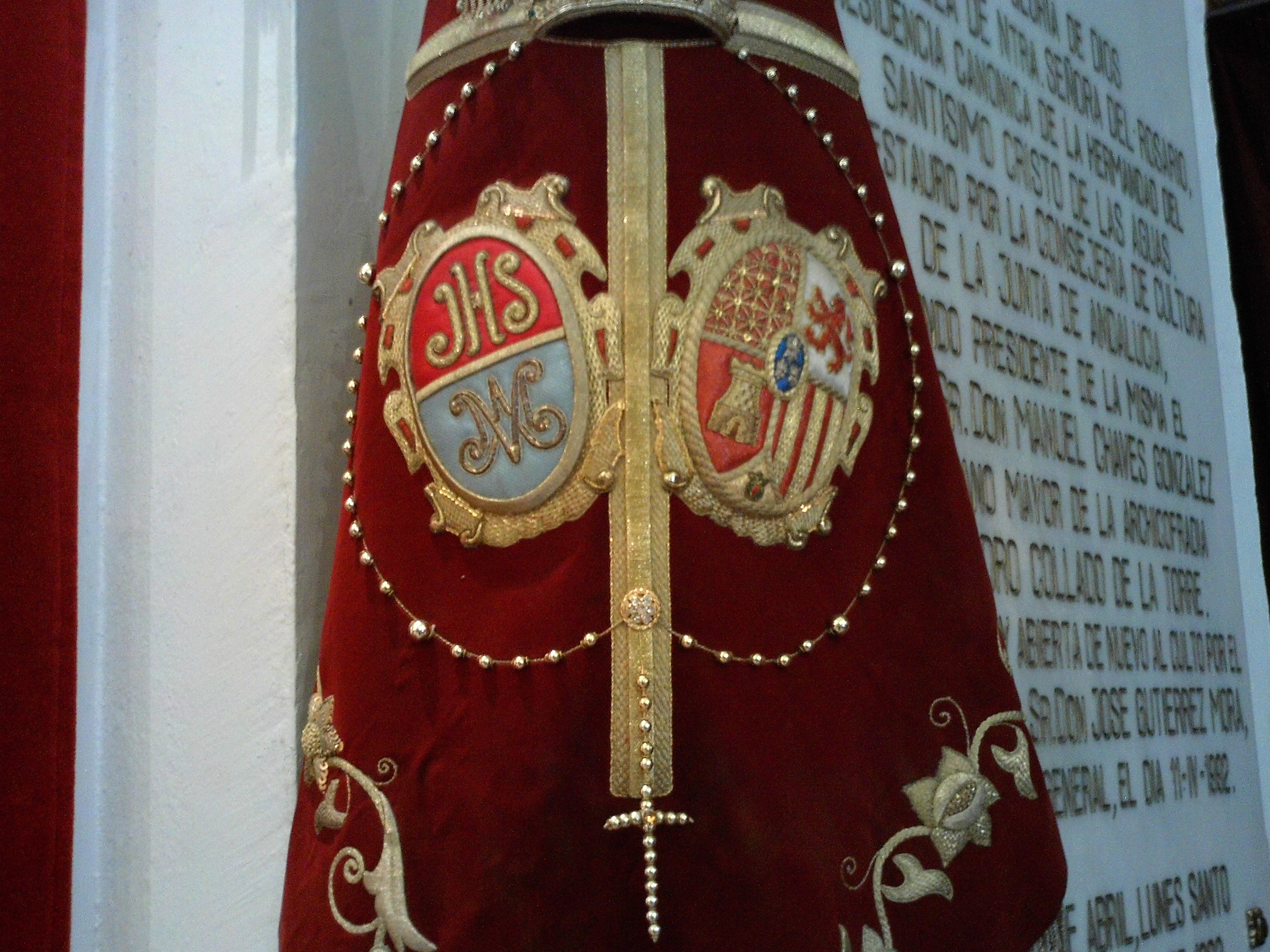 Estandarte con el escudo de la Hermandad de las Aguas en la capilla del Rosario, Sevilla, Andalucía, España.